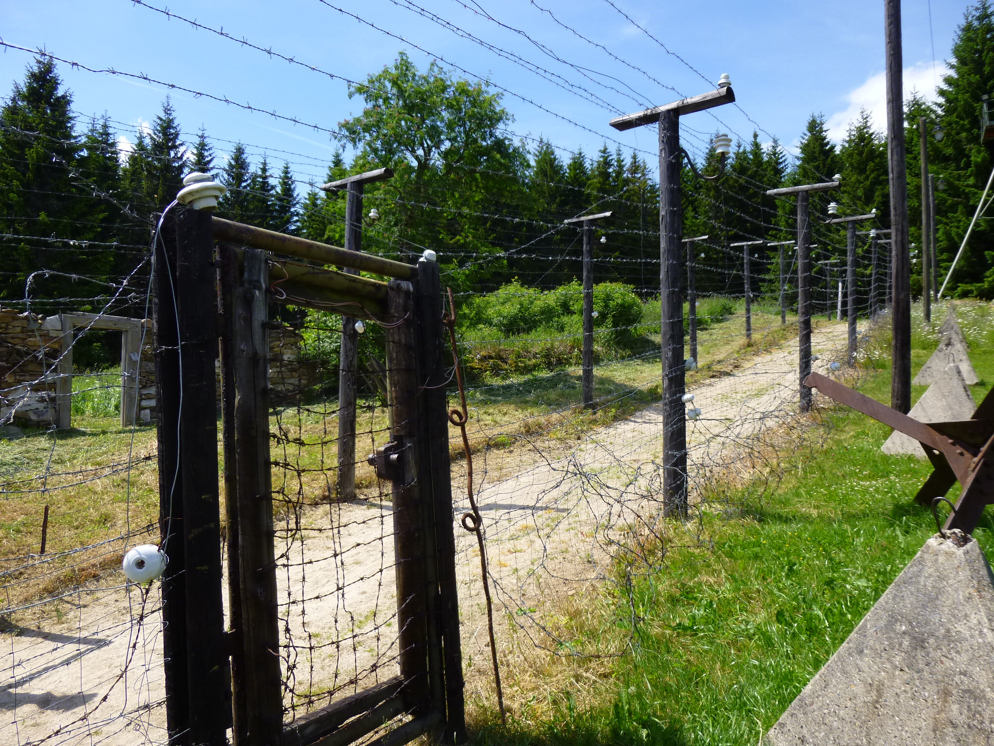 " Gedenkstätte des eisernen Vorhangs" in Bucina beim Hotel Peslova chata, Tschechien. Unweit des Grenzübergangs zum Nationalpark Bayerischer Wald bei Finsterau.